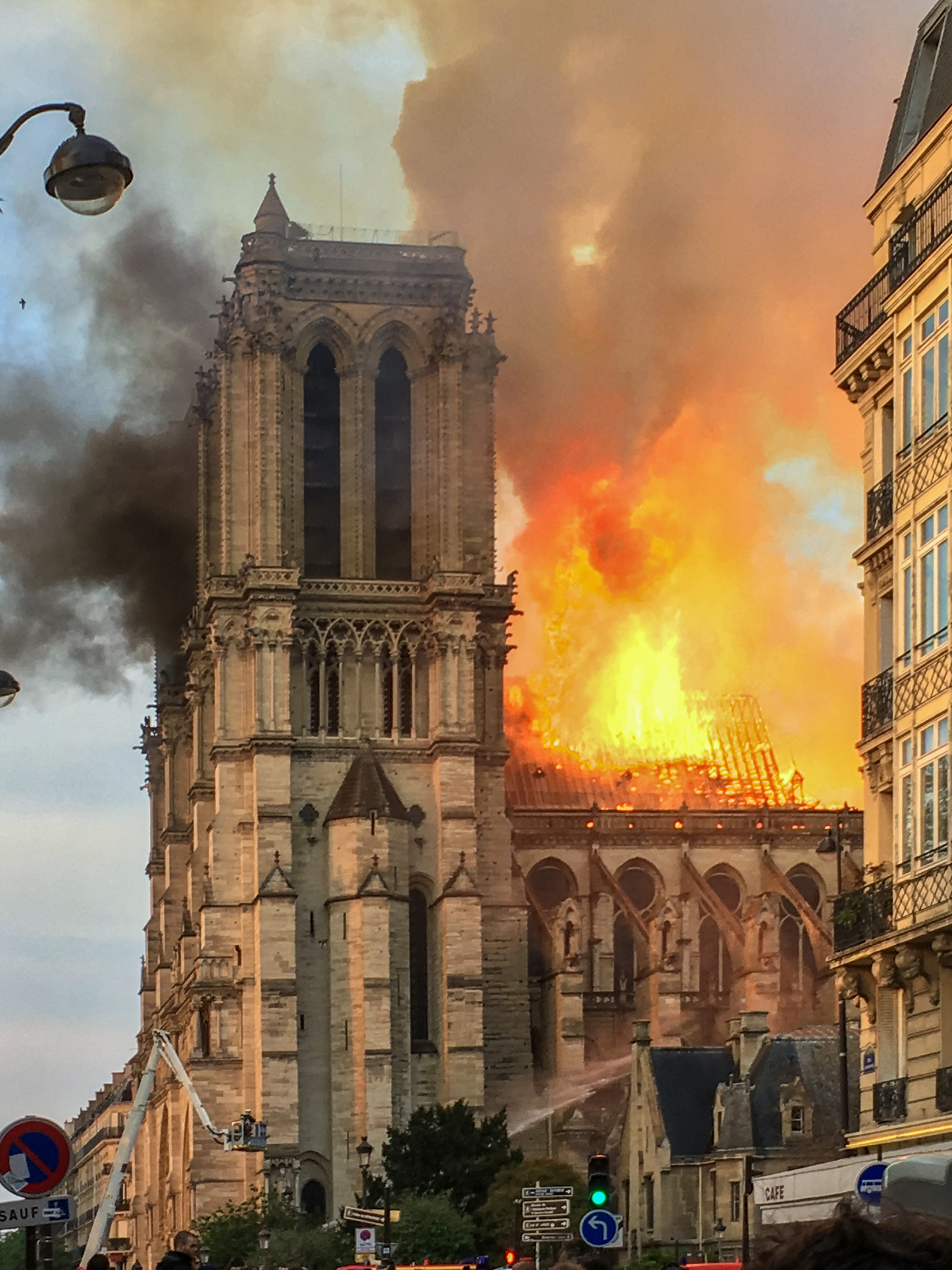 Feu dans la charpente de Notre Dame.